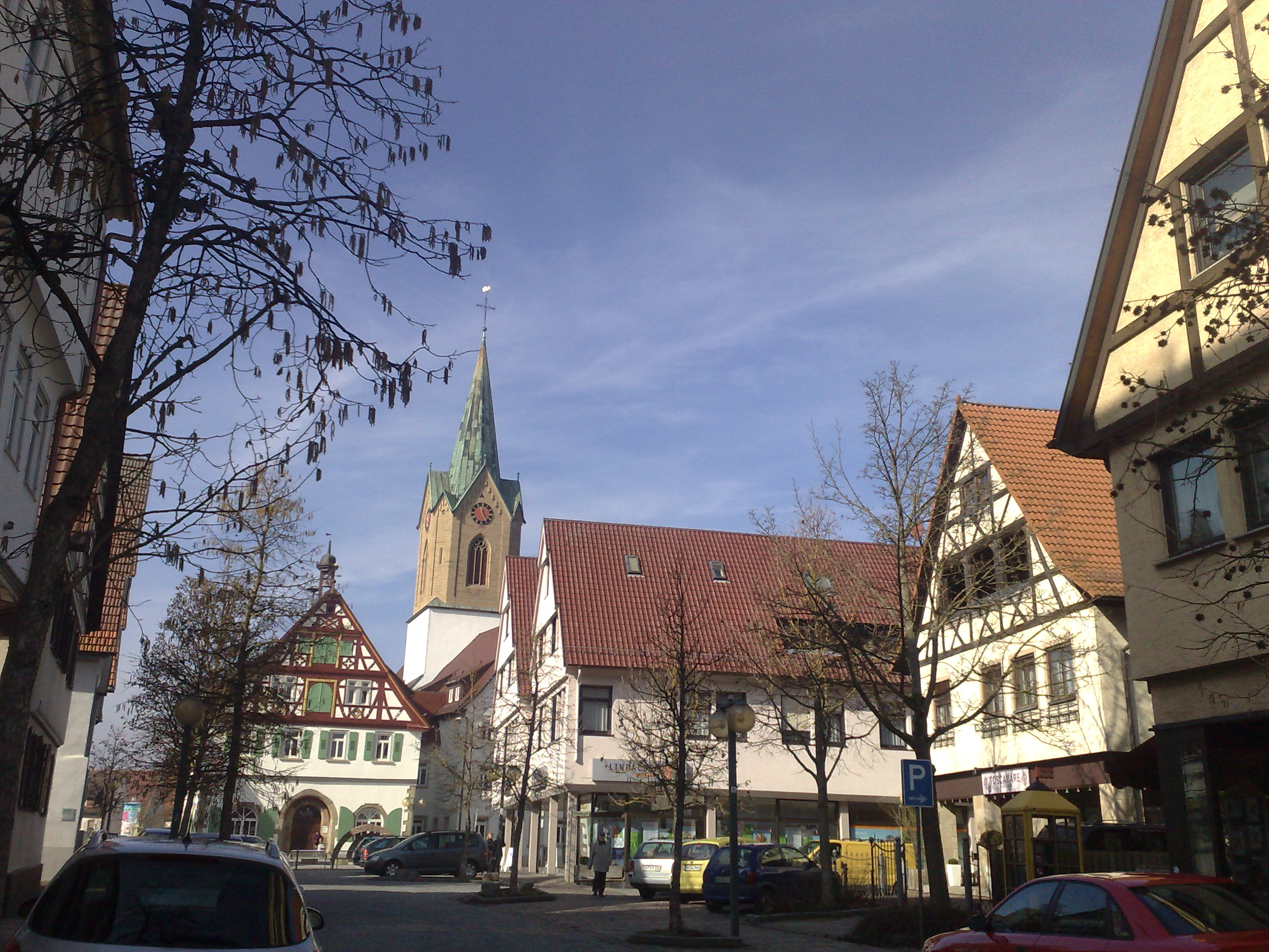 Renningen